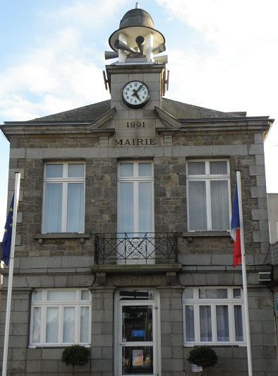 Mairie de Pleurtuit (35).